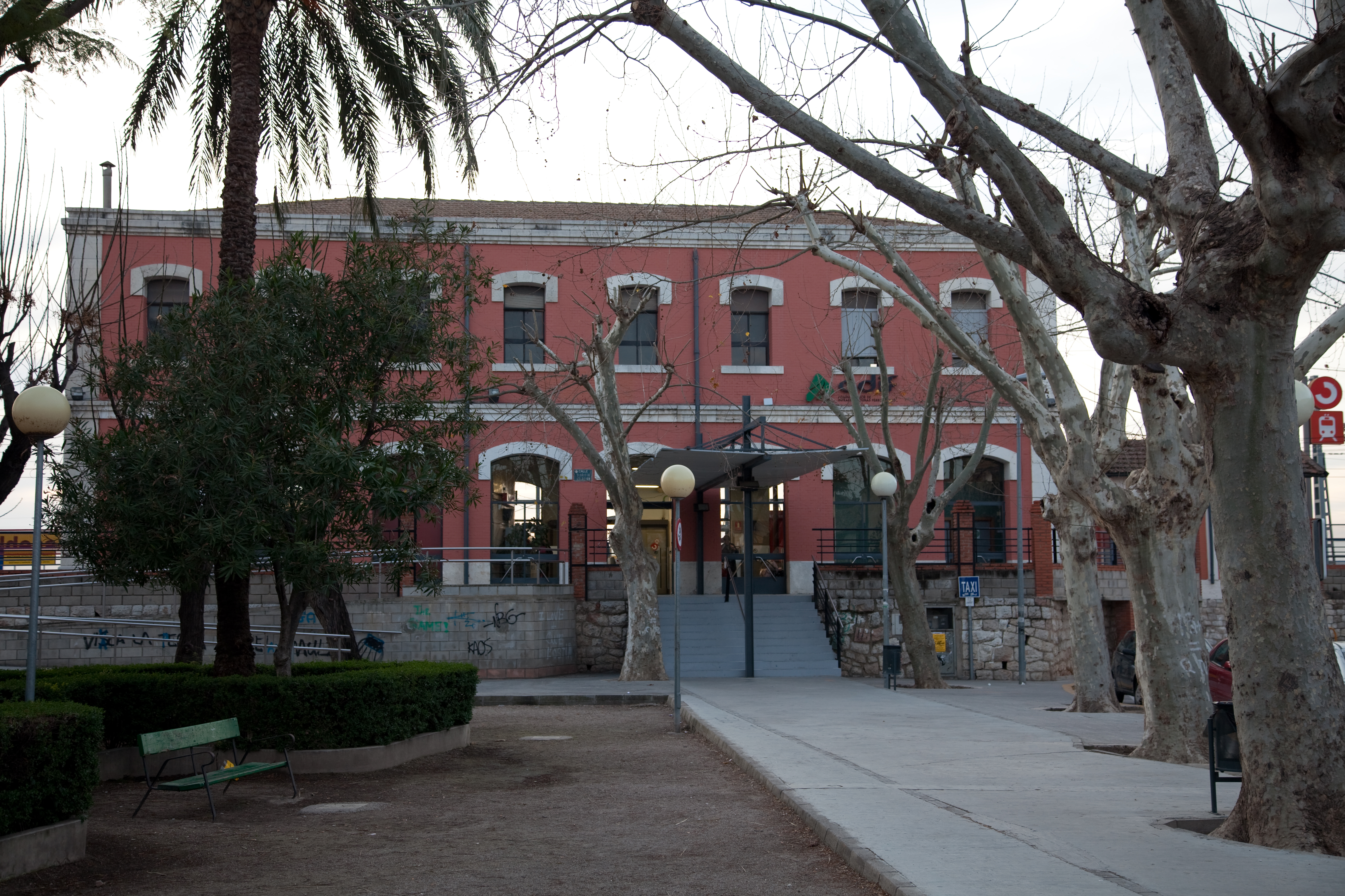 Estación de Carcagente